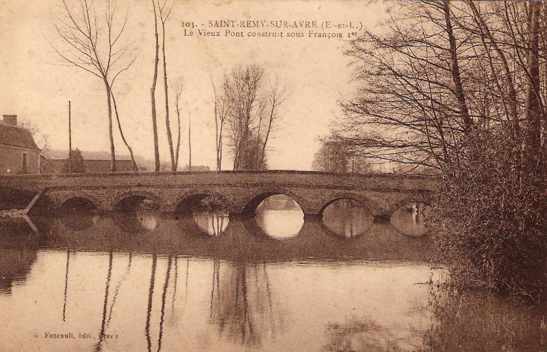 "Le Vieux Pont construit sous François 1er", Saint-Rémy-sur-Avre, Eure-et-Loir (France).